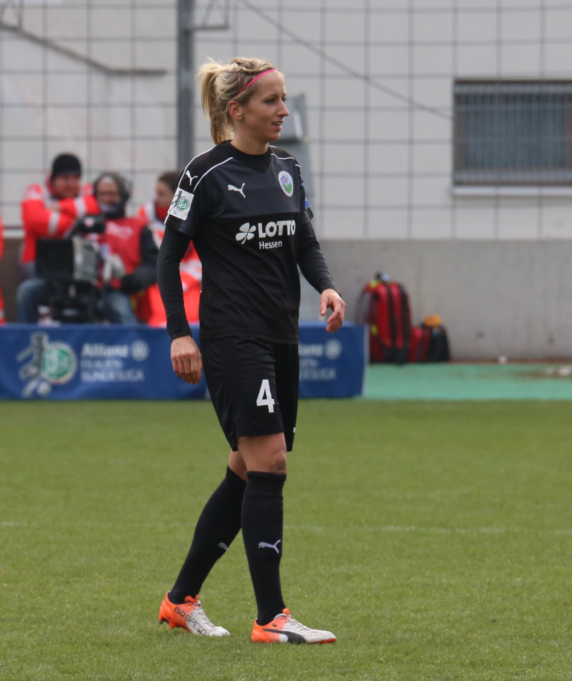 Kathrin Hendrich (1. FFC Frankfurt) beim Frauen-Bundesliga-Spiel FC Bayern München gegen 1. FFC Frankfurt am 13. November 2016 im Stadion an der Grünwalder Straße, München (Ergebnis war 1:0).